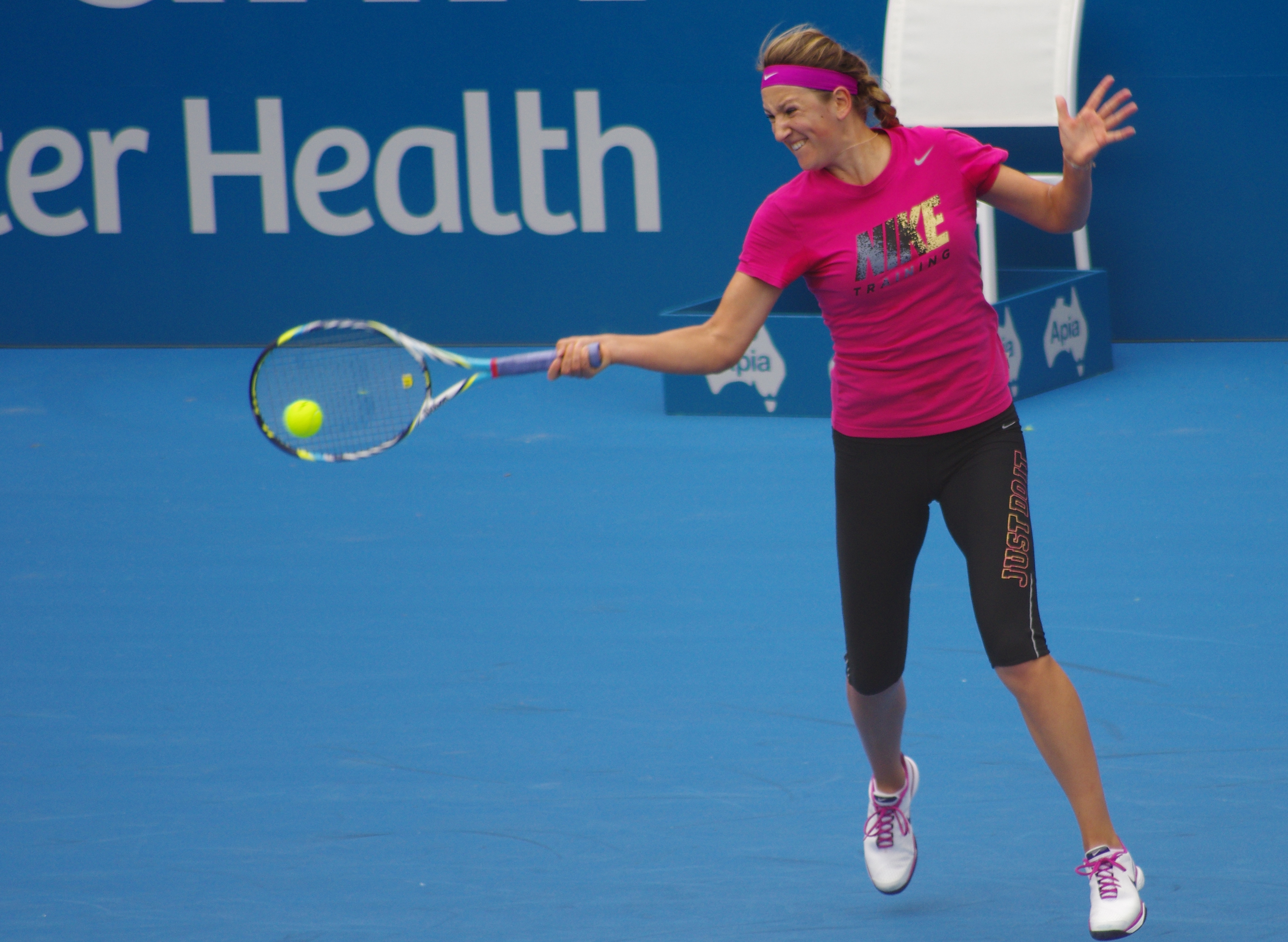 Victoria Azarenka